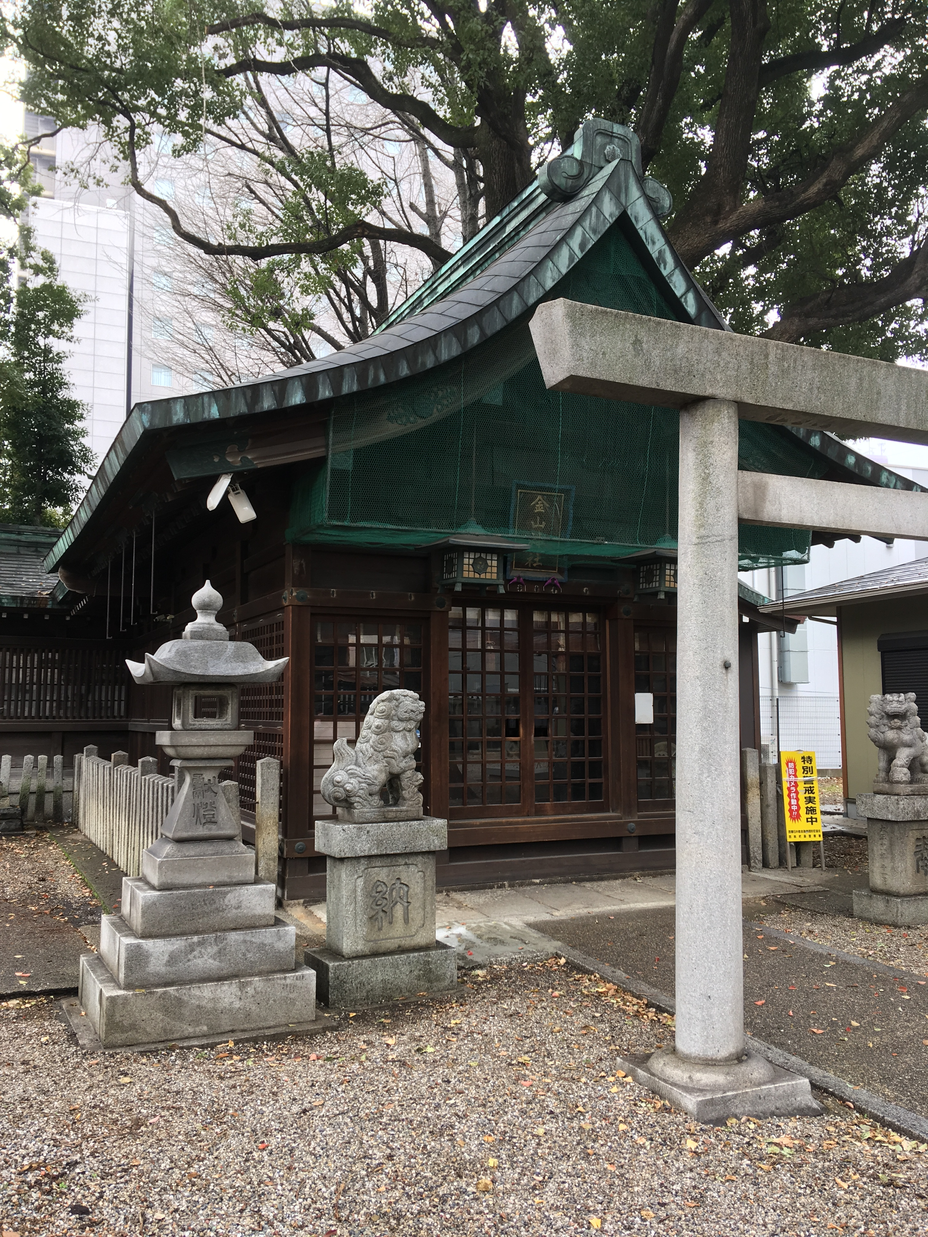 金山神社にある狛犬を撮影した写真